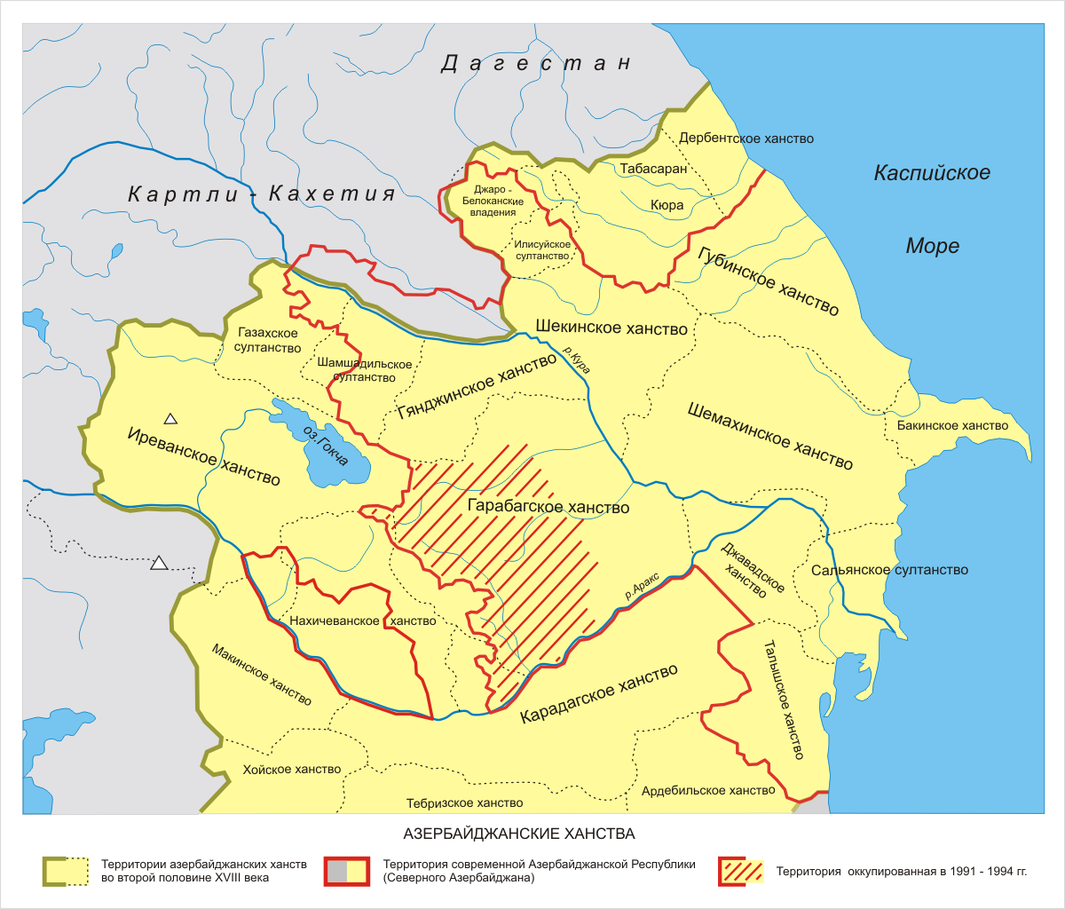 Azerbaijan Khanates, XVIII